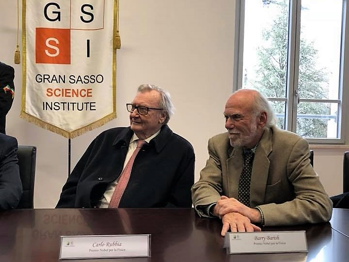 I premi Nobel per la fisica Barry Clark Barish e Carlo Rubbia all'inaugurazione della nuova sede del rettorato del Gran Sasso Science Institute.